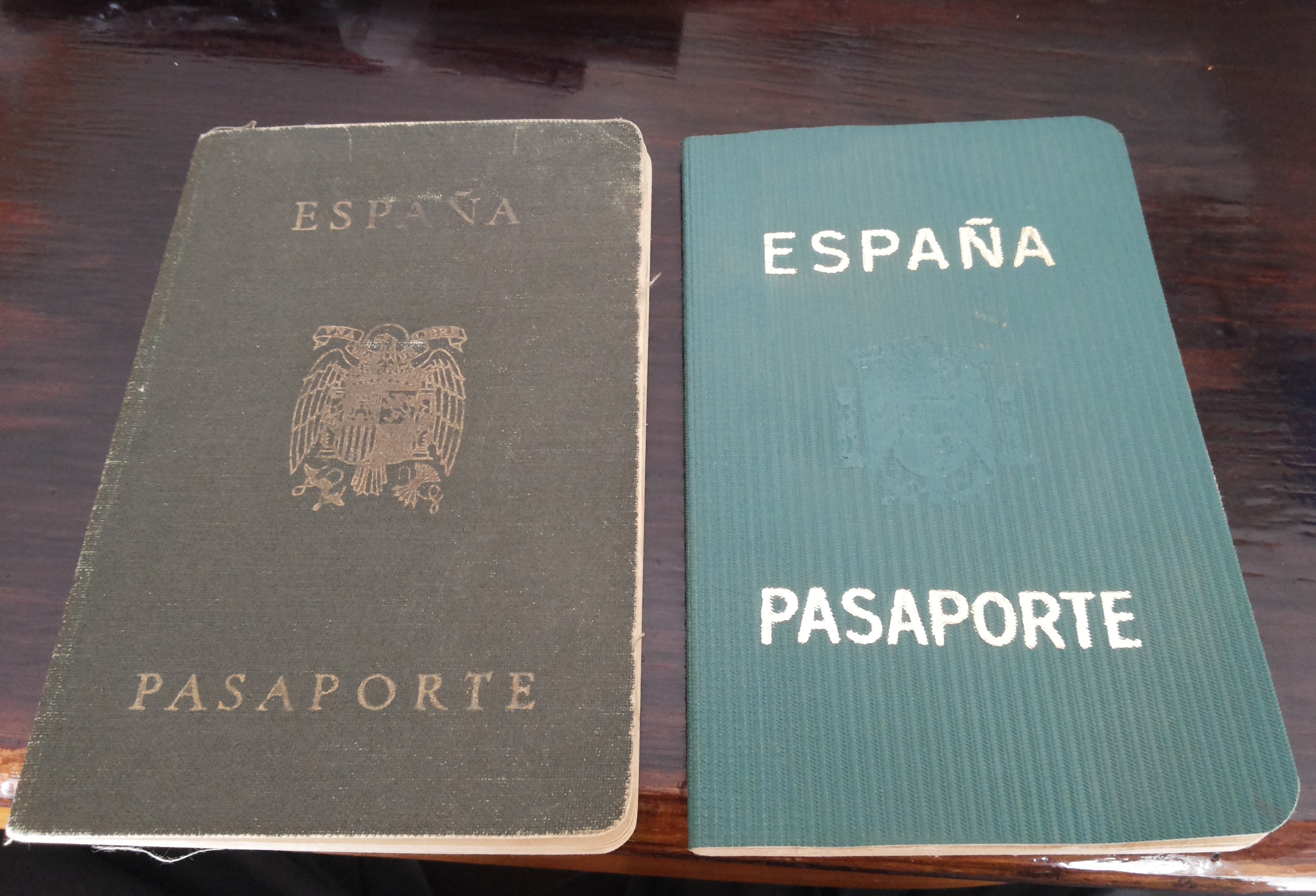 Pasaportes españoles emitidos en el consulado de Bahía Blanca, Argentina. El más reciente [derecha] data de la década de 1960.